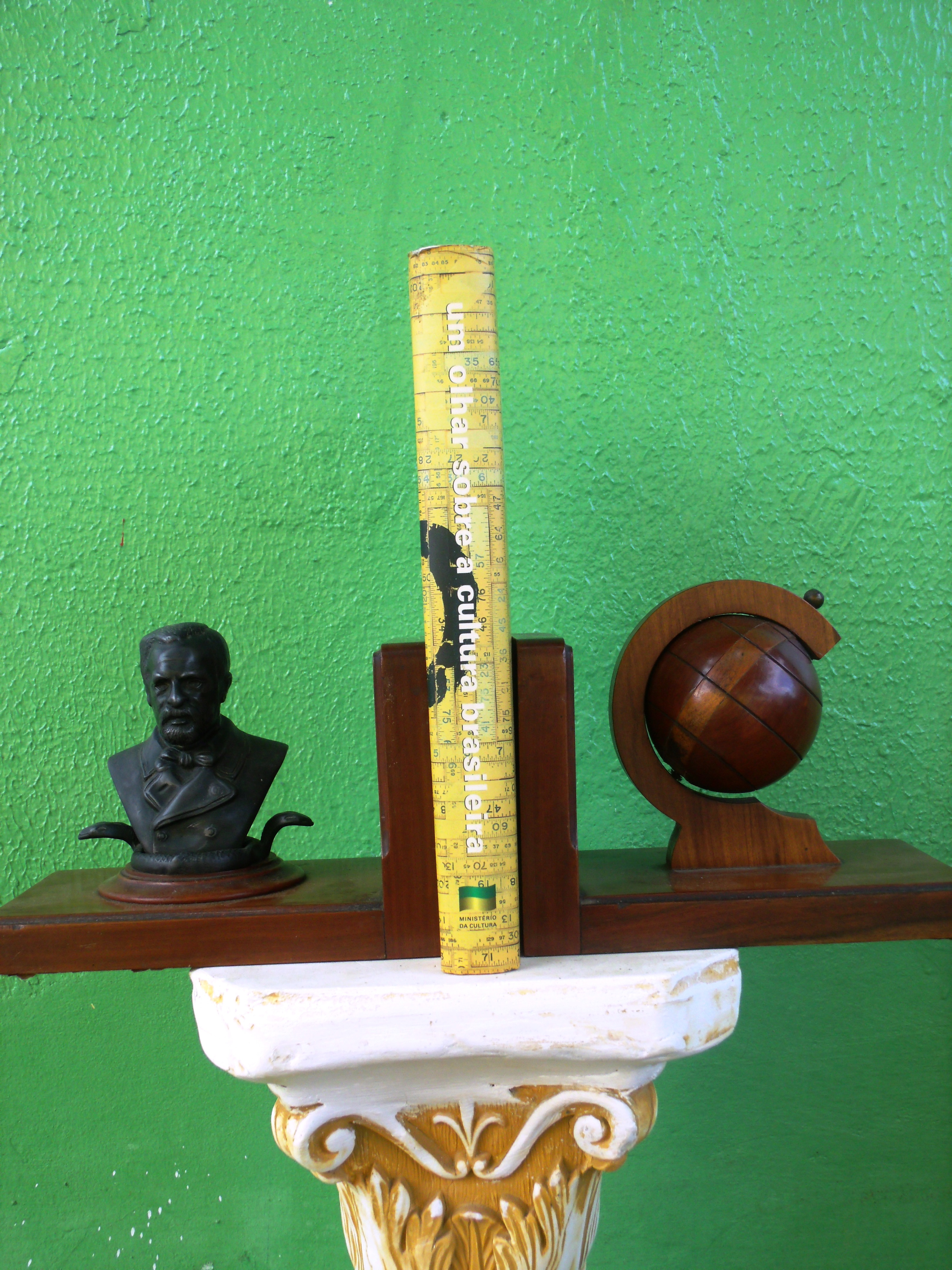 Livroː Um olhar sobre a cultura brasileira, editado em 1998, Ministério da Cultura, organizado por Francisco Weffort e Márcio Souza. Associação de Amigos da Funarte. O mini busto do bibliocanto é de Vital Brasil.